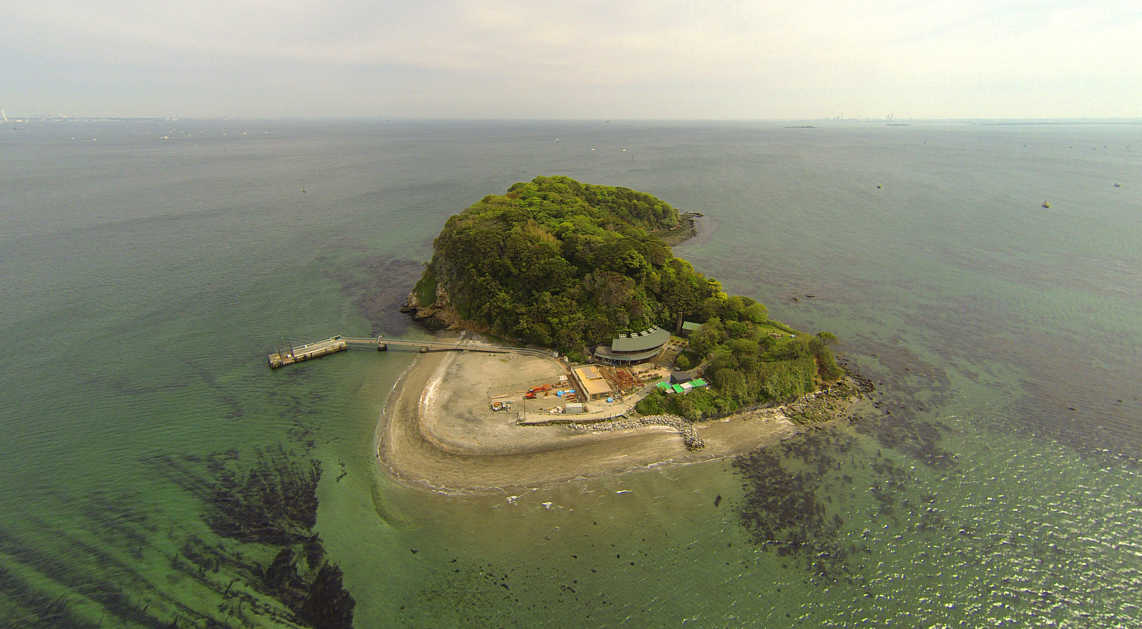 横須賀市の猿島上空からの画像